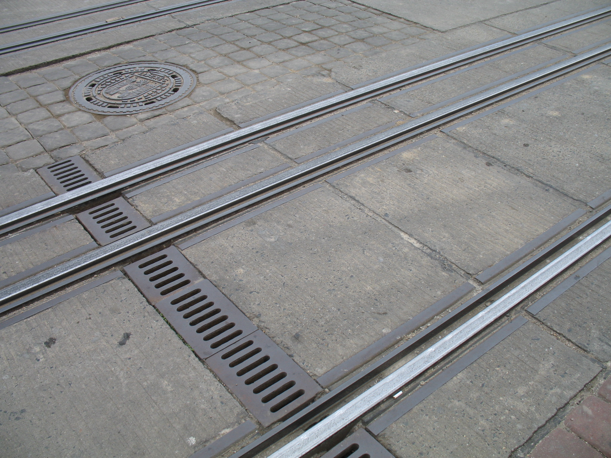 Liberec - tory tramwajowe